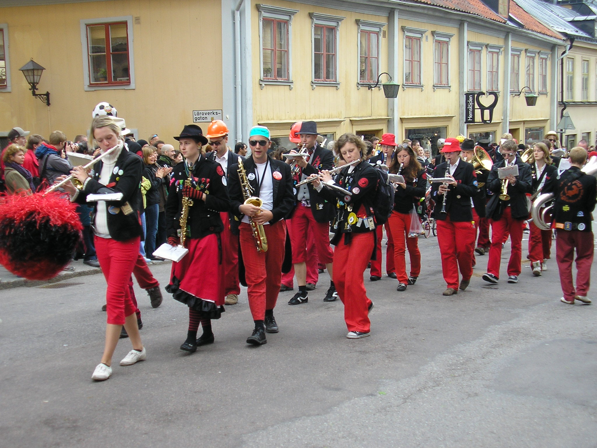 Orkestern Alte Kamereren i kortegen/kårtegen på Studentorkesterfestivalen i Linköping. Bilden är tagen från storgatans södra sida, mittemot stadshuset.